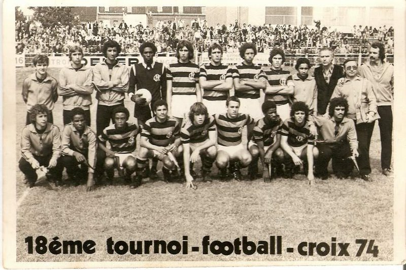 Em pé esquerda para direita : Tita , Washington , Renato II , Sergio , Jorge Luis , Russo , Gideoni , Heleno , Wanderley ,Dr. Marcelo , Dr. Giuseppe Taranto , técnico Jaime Valente . Agachados : Jair , Lima , Ruy , Renato , Armando , Aloisio Guerreiro , Adilio , Julio Cesar Urigheller , Sérgio II .